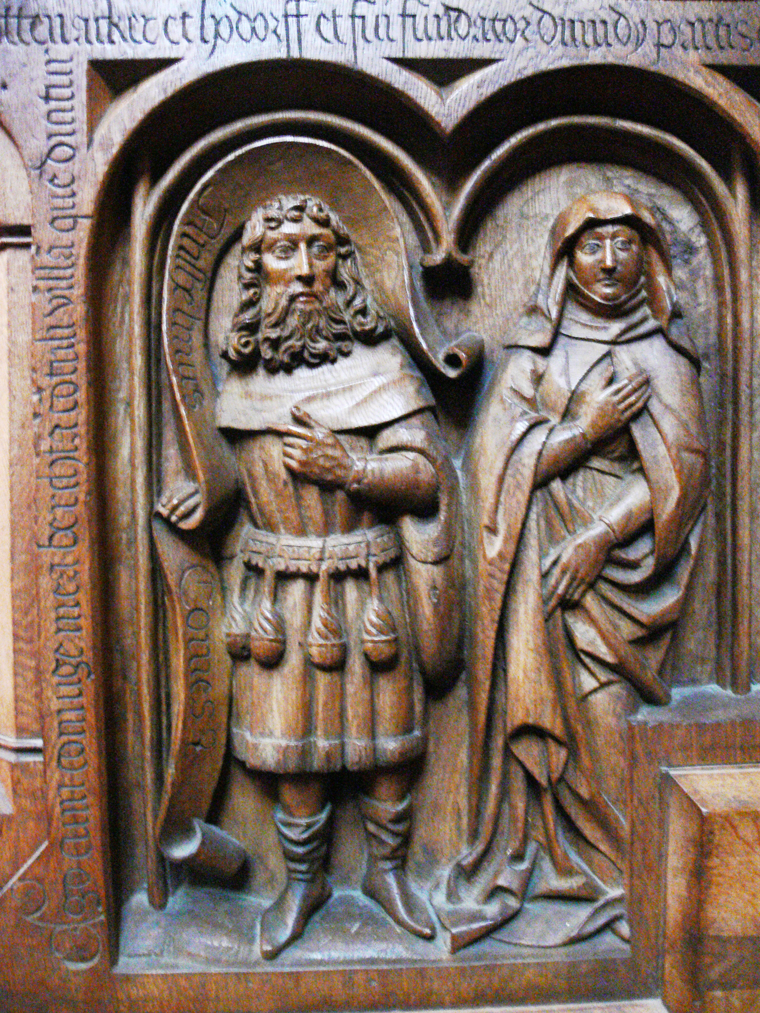 Kloster Blaubeuren, Klosterkirche, Chorraum Chorgestühl von Jörg Syrlin d. J., 1493 Stifterrelief Anselm von Tübingen, Graf von Nagoldgau (Bruder des Hugo III. von Tübingen) und seine Gemahlin Berchta/Bertha („Ego cum coniuge mea berchta contuli villam que dicitur rottenacker et hoedorff et fui fondator dimidie partis ecclesie. Anshelmus Comes. Berchta uxor eius.“)